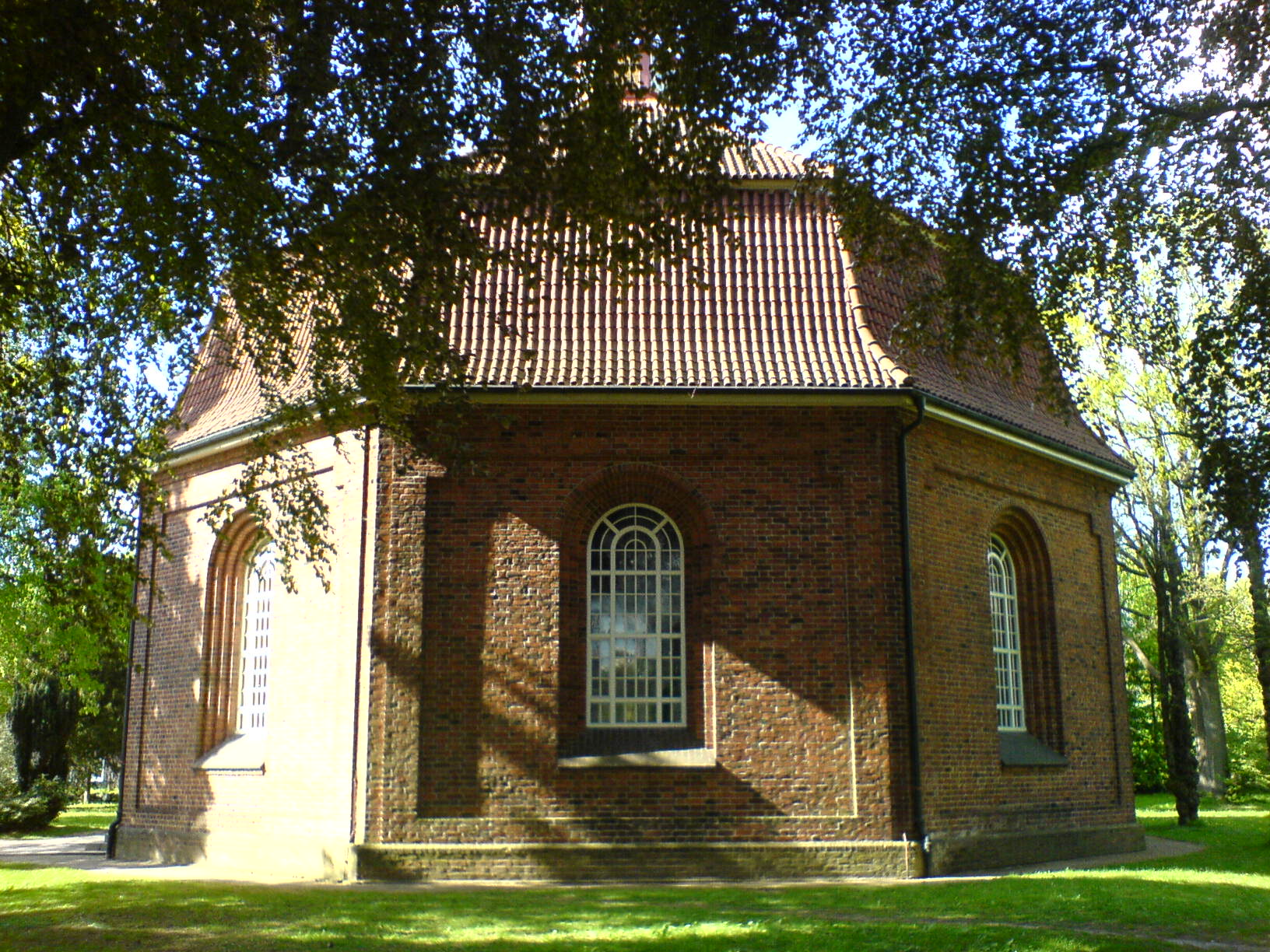 Brander Kirche in Brande-Hörnerkirchen